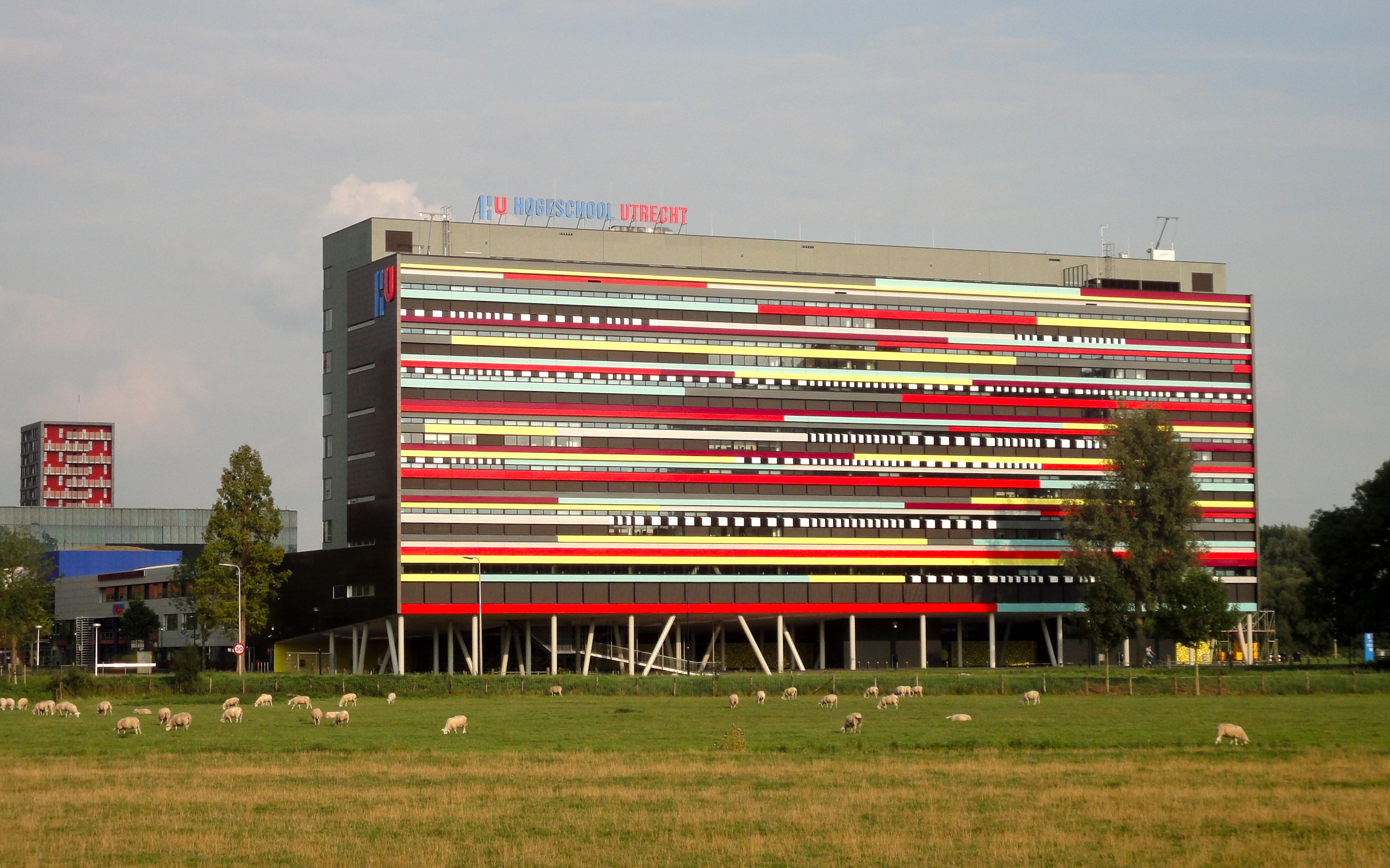 Gebouw van de Hogeschool Utrecht op de Uithof, vanaf de Sorbonnelaan. Foeilelijk, in mijn optiek.